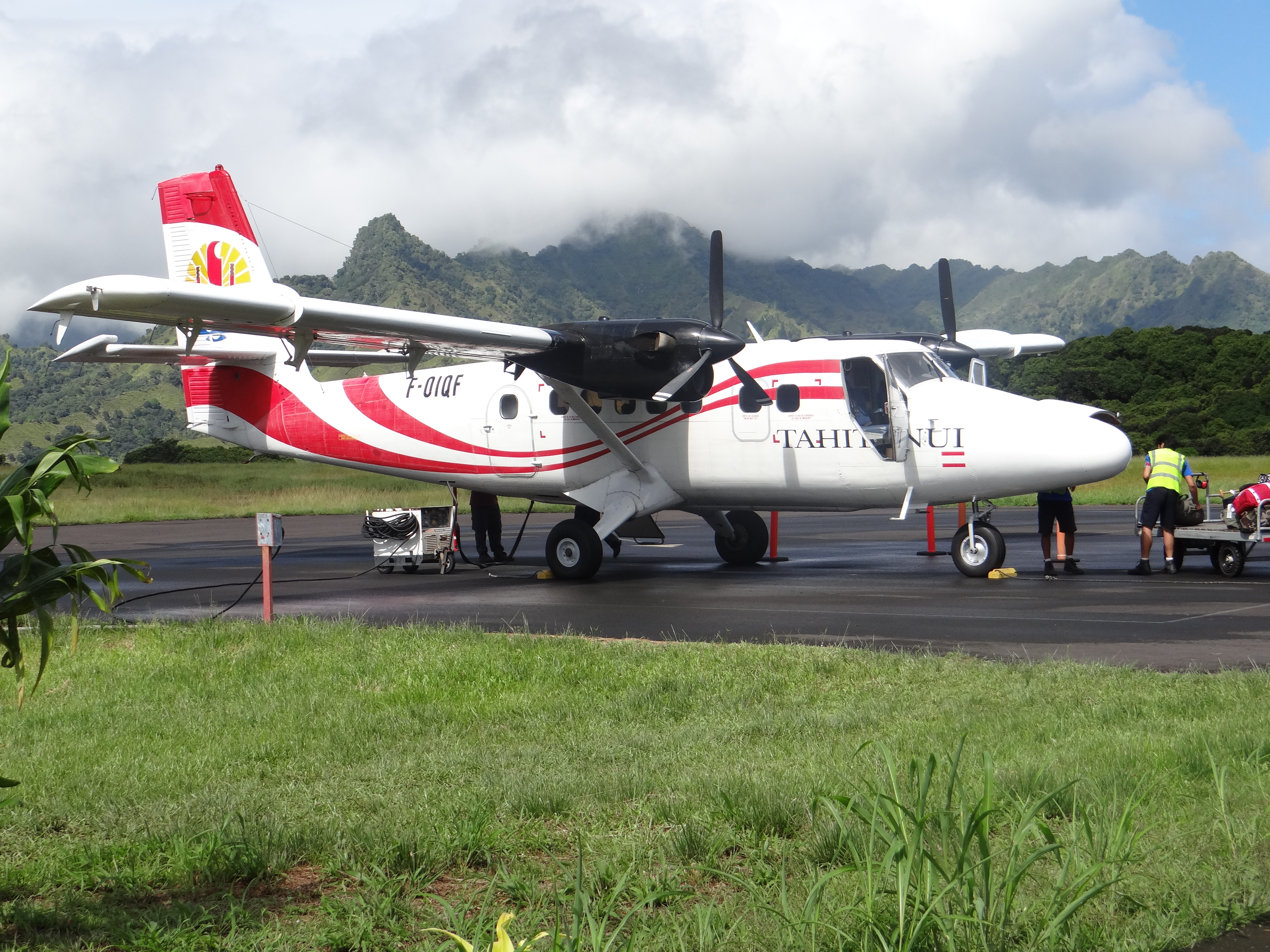 Petit bimoteur turbopropulsé aux couleurs rouge et blanche de la Polynésie sur un aérodrome des îles Marquises